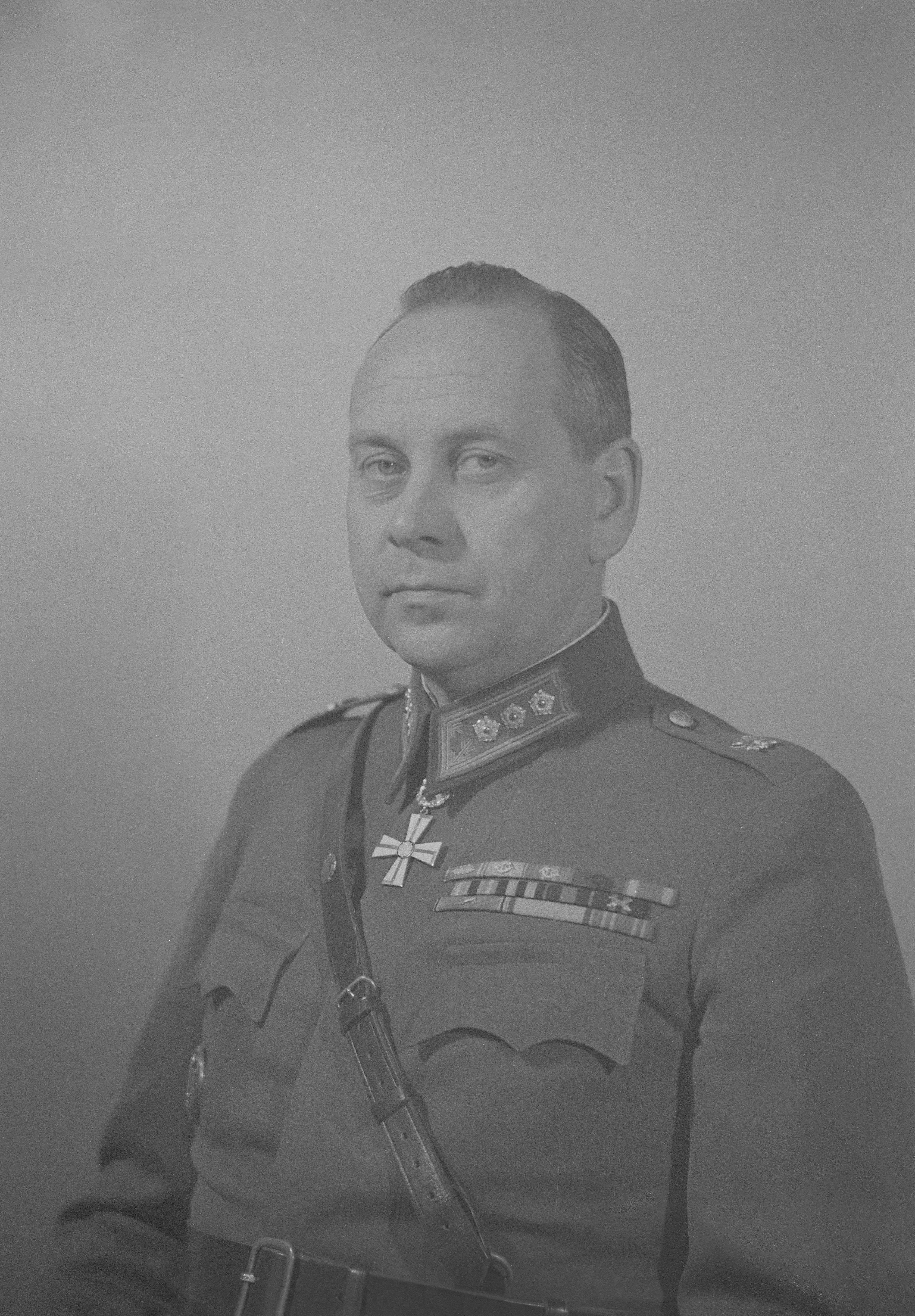 Eversti Vaala